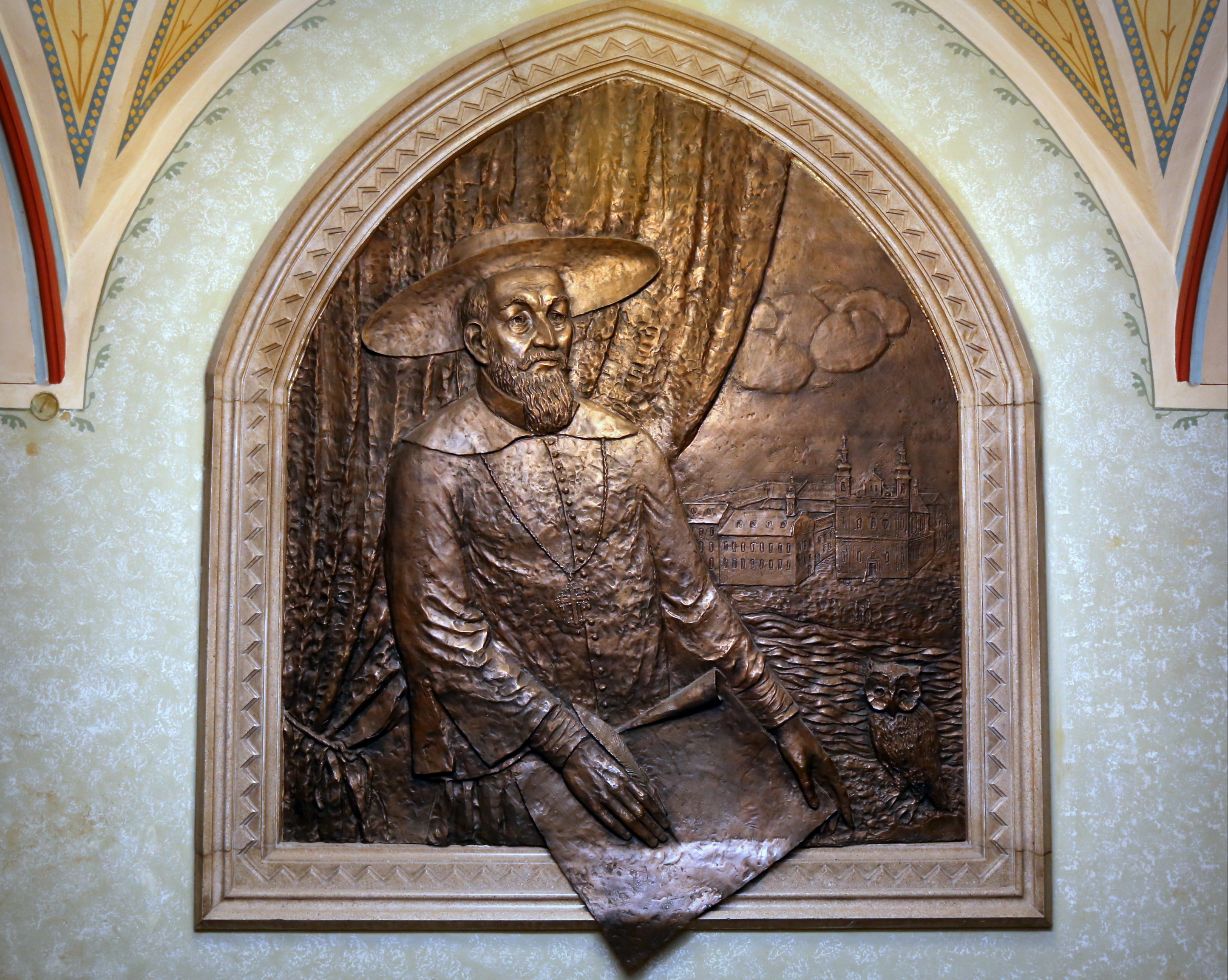 Pázmány Péter Katolikus Egyetem Jog- és Államtudományi Kar, - Pázmány Péter dombormű a lépcsőházban. - Budapest VIII. kerület, Szentkirályi utca 28-30. szám